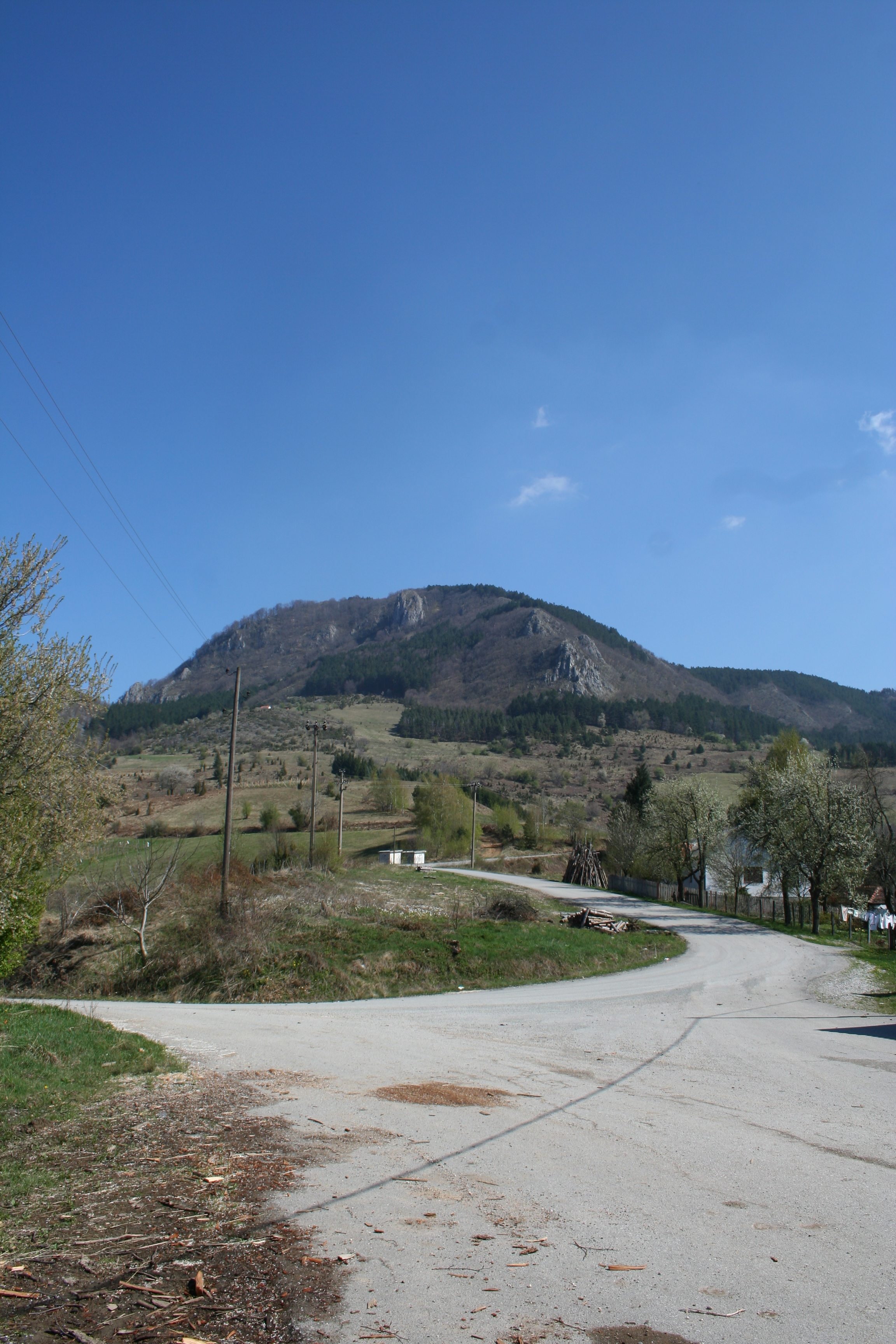 Put za Bobiju